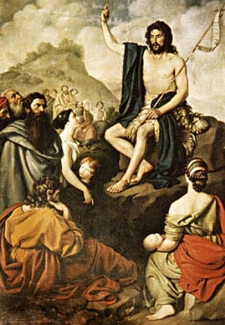 Gloria di Giovanni Bono, olio su tela, pala d'altare della chiesa dei SS. Giovanni Battista e Giovanni Bono, Recco